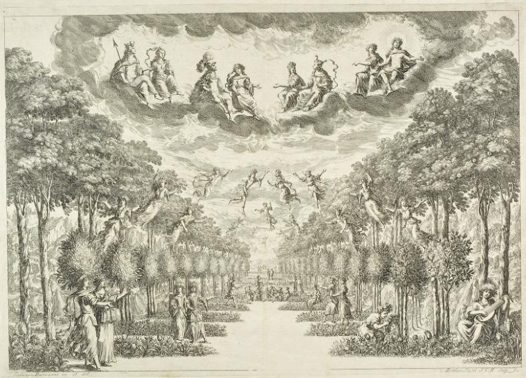 Campos elíseos. Grabado de Mathäus Küsel por diseño de Ludovico Ottavio Burnacini para "La monarchia latina trionfante : festa musicale : in applauso del felicissimo natale del Sereniss. Gioseffo, arciduca d'Austria, figlio delle Augustiss. Maesta` di Leopoldo imperatore, et Eleonora, Maddalena, Teresa, imperatrice, nata prencipessa di Neoburgo : alle medesime M.M. consacrata" Viena, 1678, representación operística con libreto de Niccolò Minato y música de Antonio Draghi, representada en el Teatro de la Cortina con motivo del nacimiento del más tarde emperador José I.